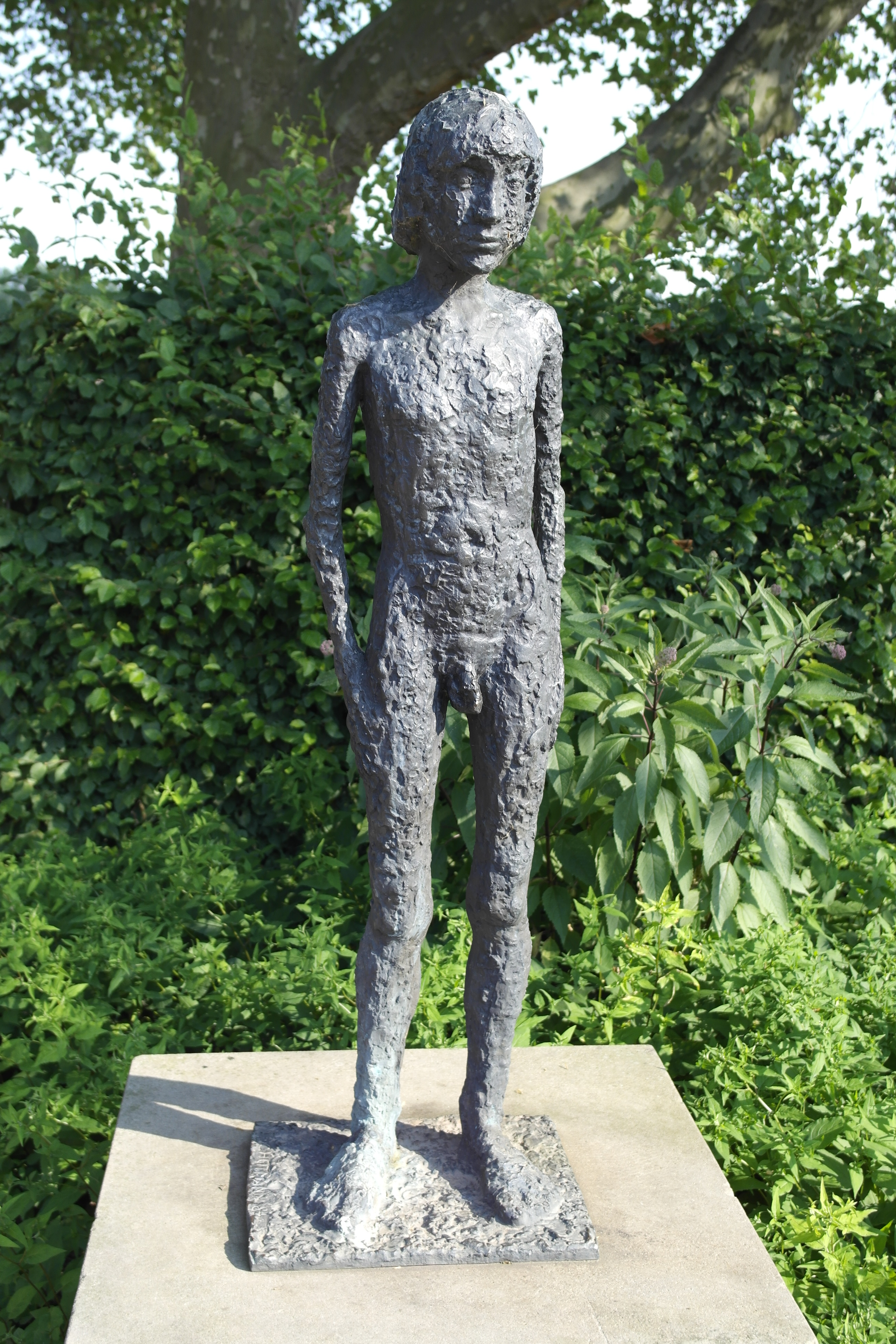 Dresden-Neustadt: Plastik Stehender Knabe von Christine Heitmann am Neustädter Elbufer / Königsufer